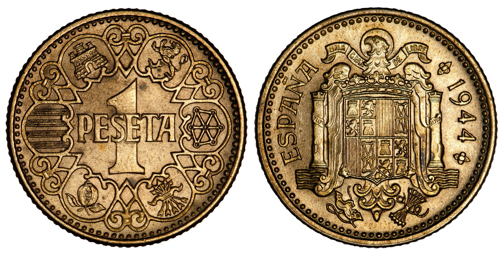 Una Peseta 1944